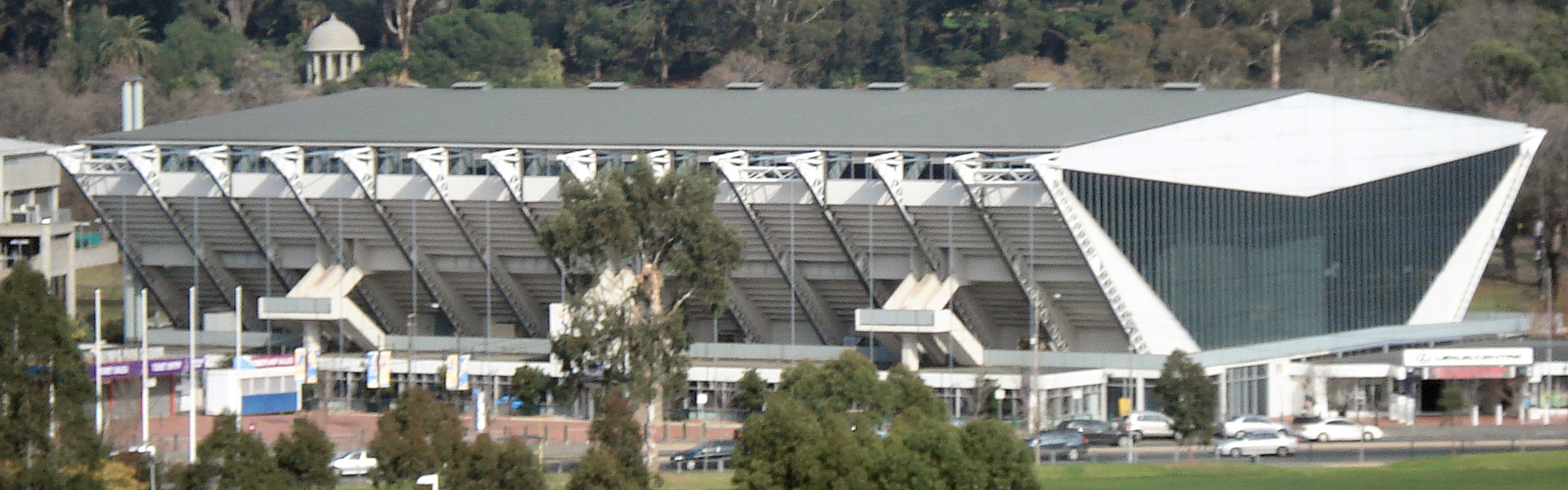 Lexus Centre from MCG